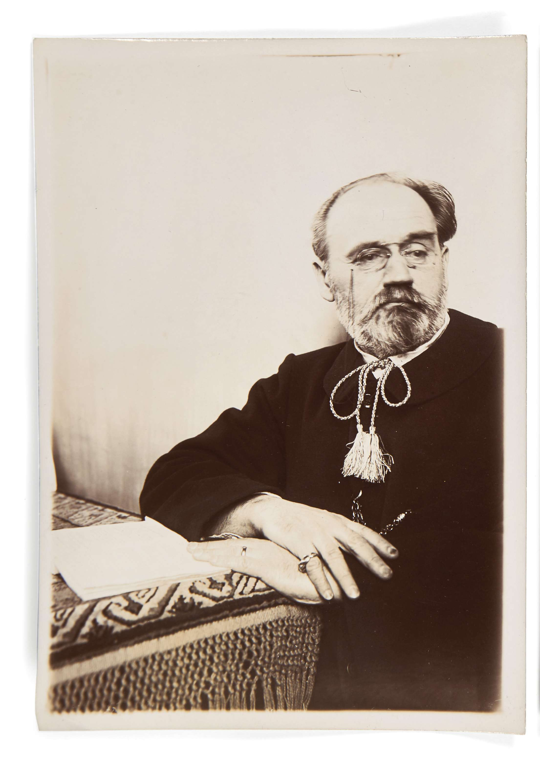 Autoportrait d'Émile Zola. Vente aux enchères de l'ancienne collection François Émile-Zola